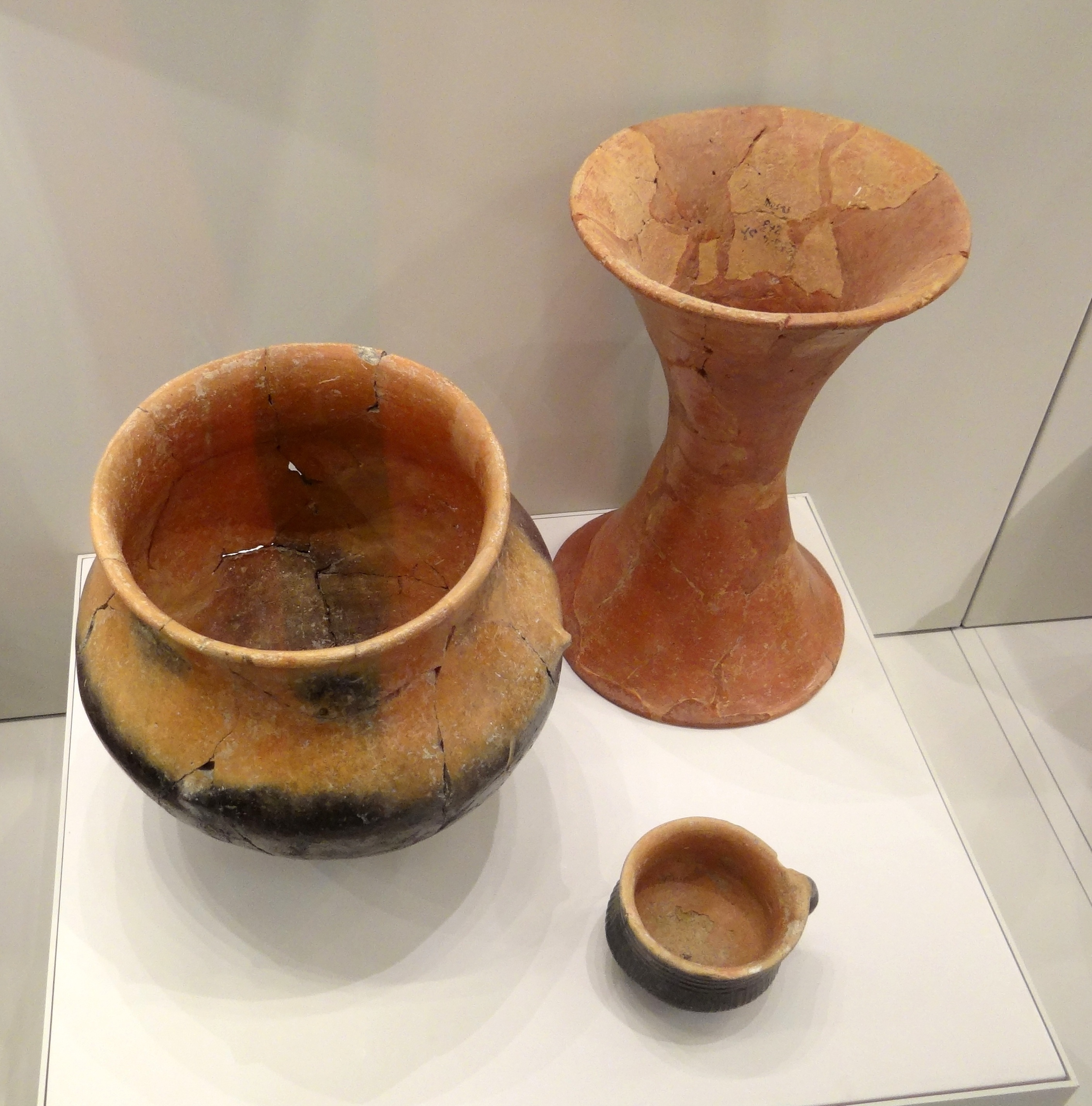 Beth Yerah Pottery from Early Bronze Age כלי בית ירח, משפחת כלים מתקופת הברונזה הקדומה הנקראת על שם תל בית ירח ליד הכנרת